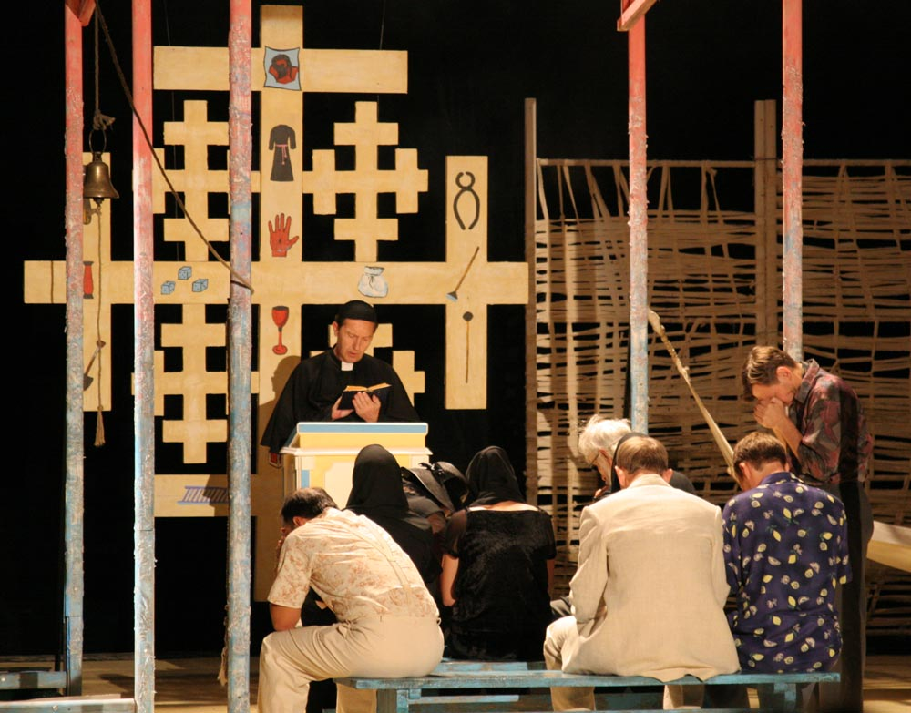 Сцена из спектакля Саратовского театра юного зрителя «Гальера» по пьесе Михаила Бартенева